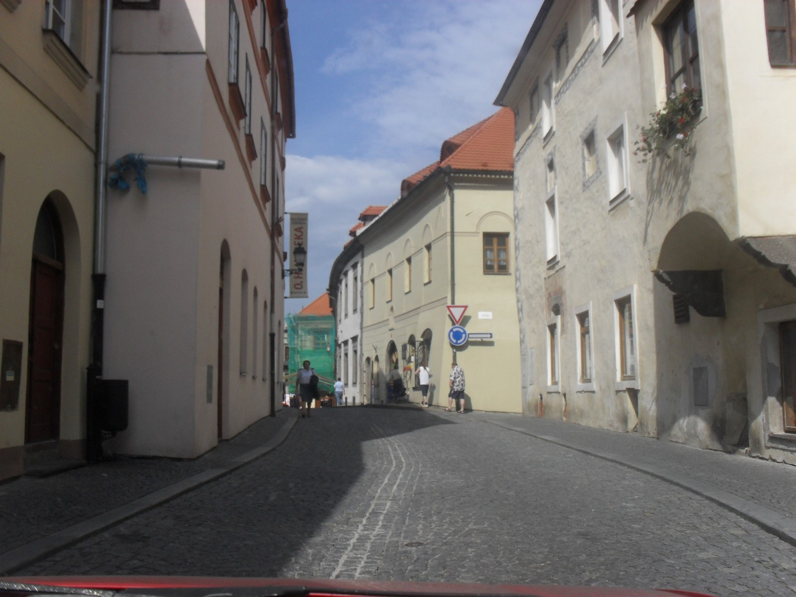 Prachatice, Solní ulice